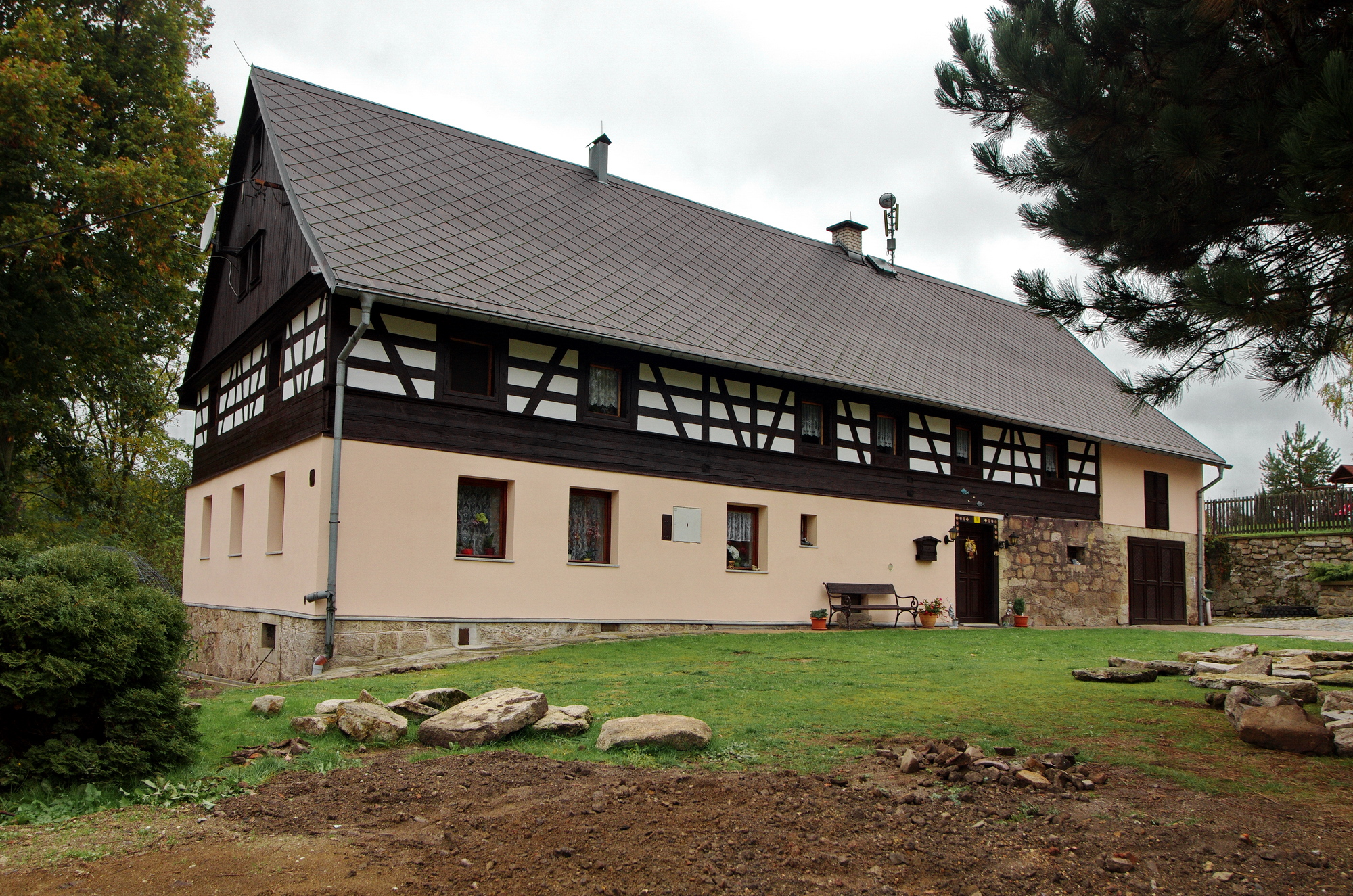 Hrázděné stavení v Hruškové, okres Sokolov